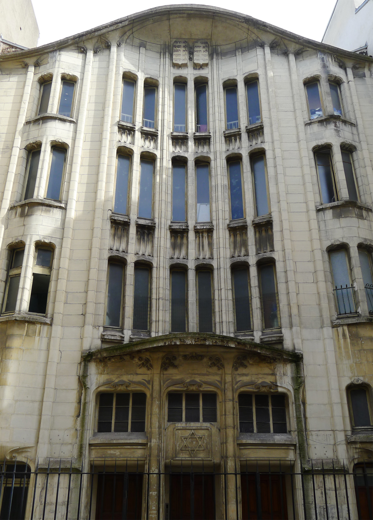 Façade de la synagogue du n°10 de la rue Pavée - Paris IV